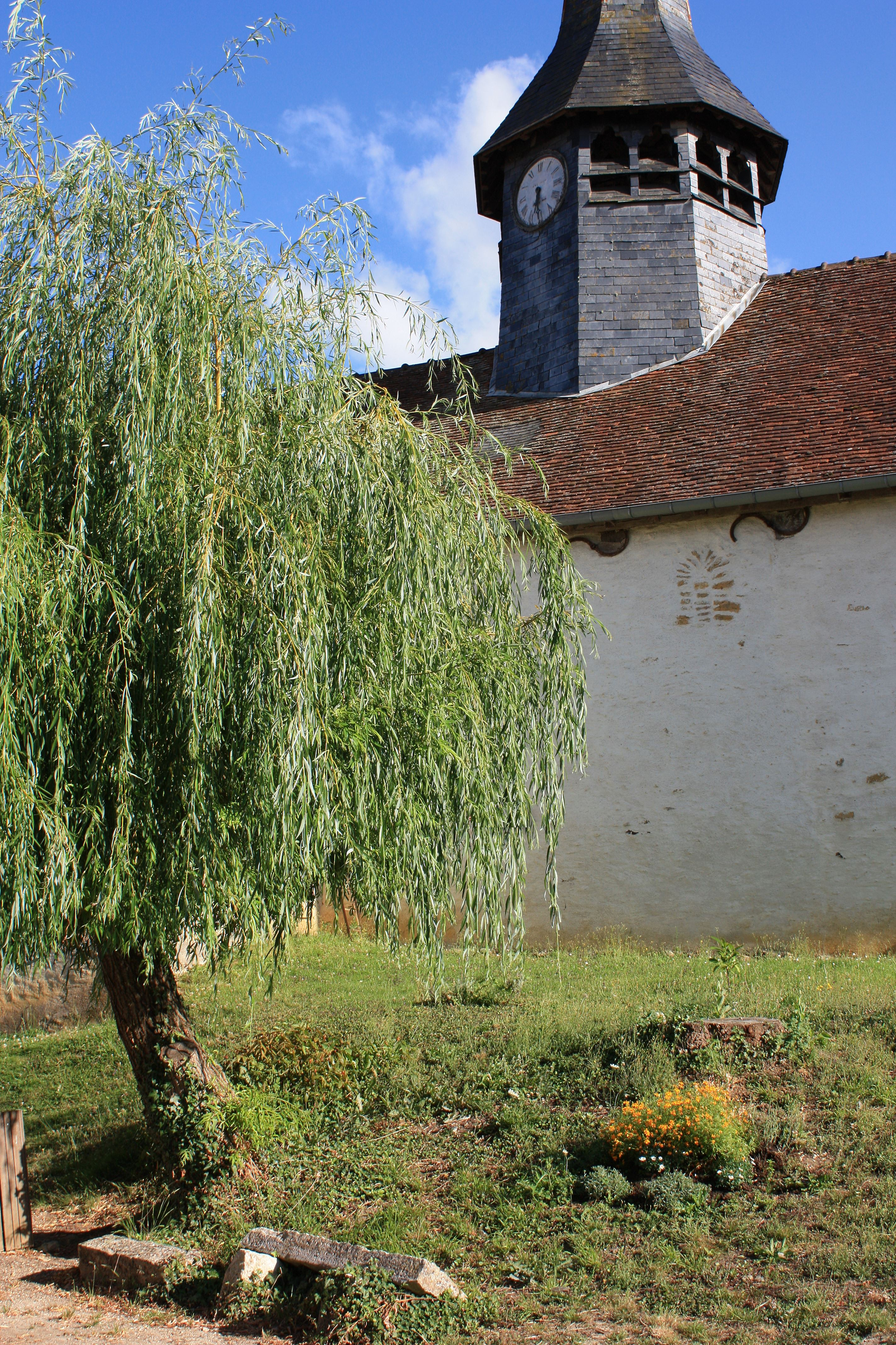 Fralignes église mur Nord